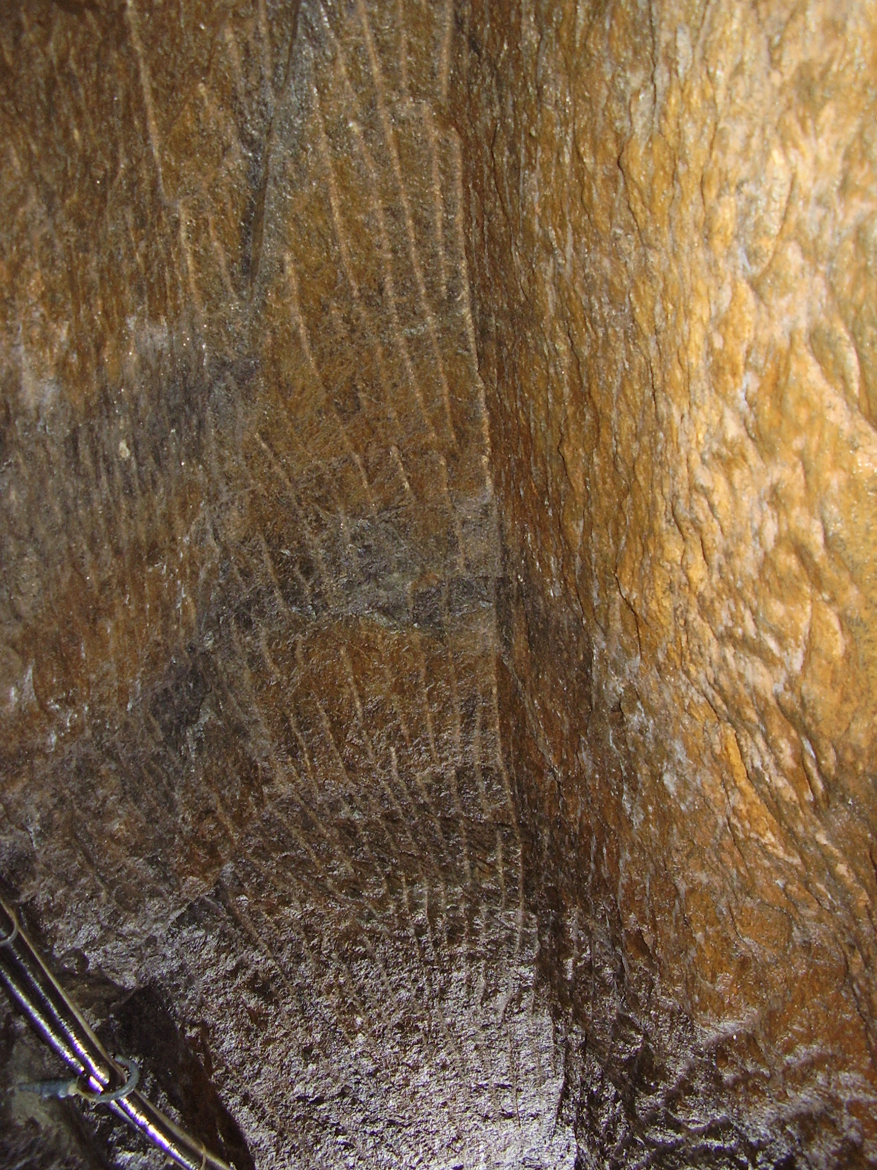 Schlägelspuren in der Firste einer Strecke